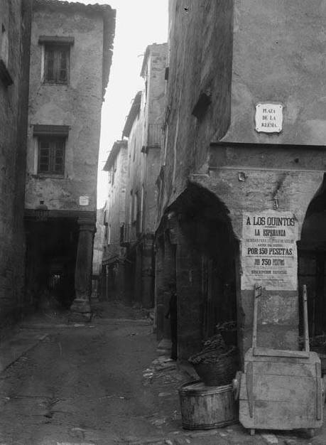 Imatge